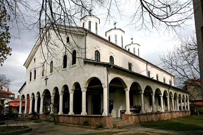 Саборна црква у Тијабари, Пирот